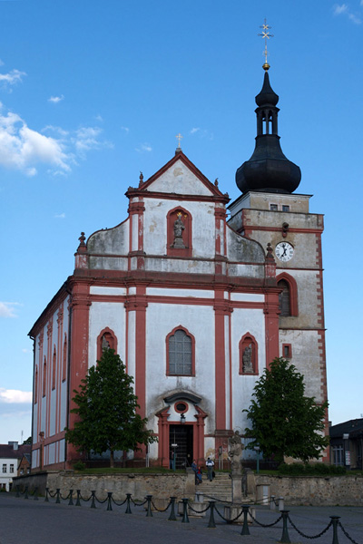 Poutní kostel sv. Mikuláše v Boru u Tachova